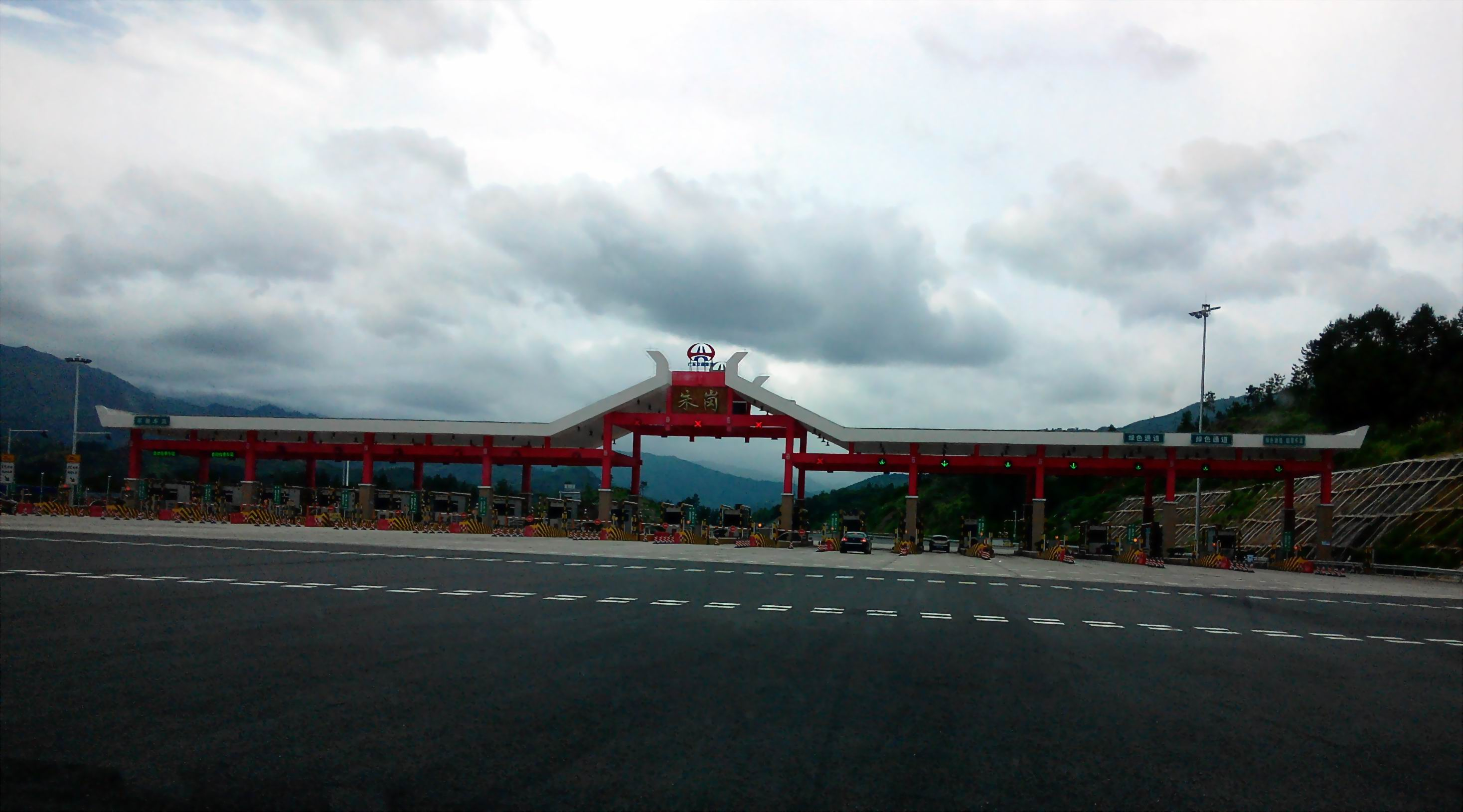 中国高速G55 二连浩特方向 朱岗收费站